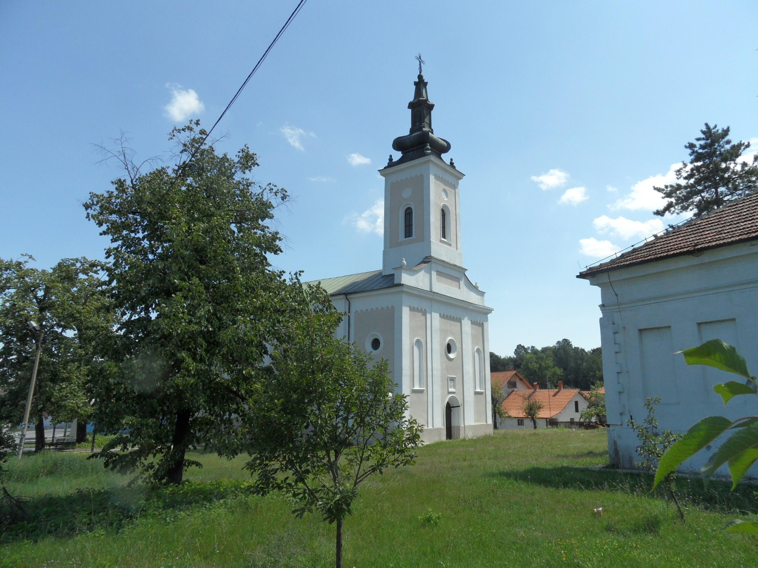 Црква Успења Богородице у Слатини